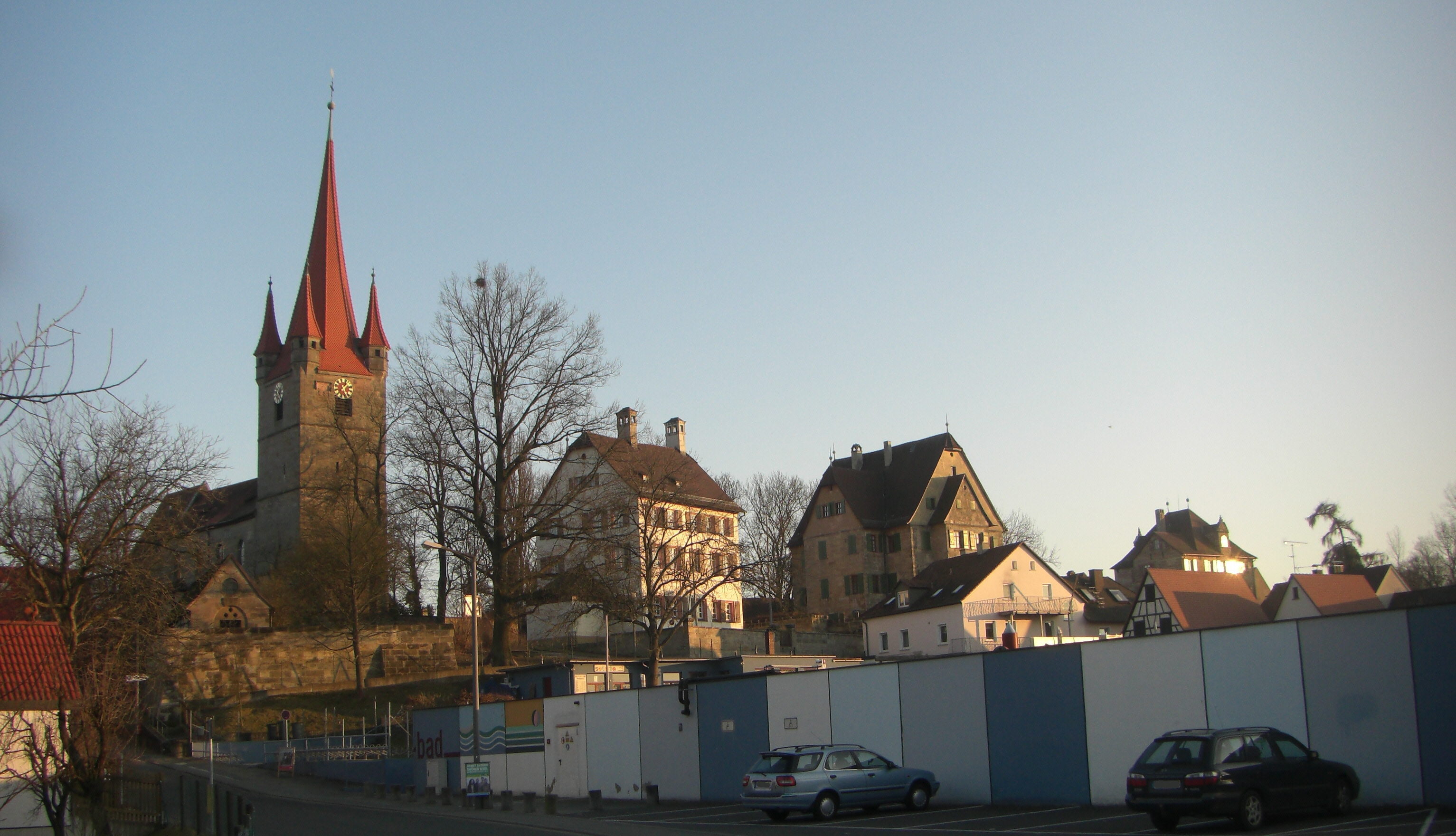 Ensemble Oberer Markt - Kirche und Schlösser in Heroldsberg (von links: Kirche, Weißes Schloss, Grünes Schloss, Rotes Schloss) Landkreis Erlangen-Höchstadt, Mittelfranken, Bayern, Deutschland